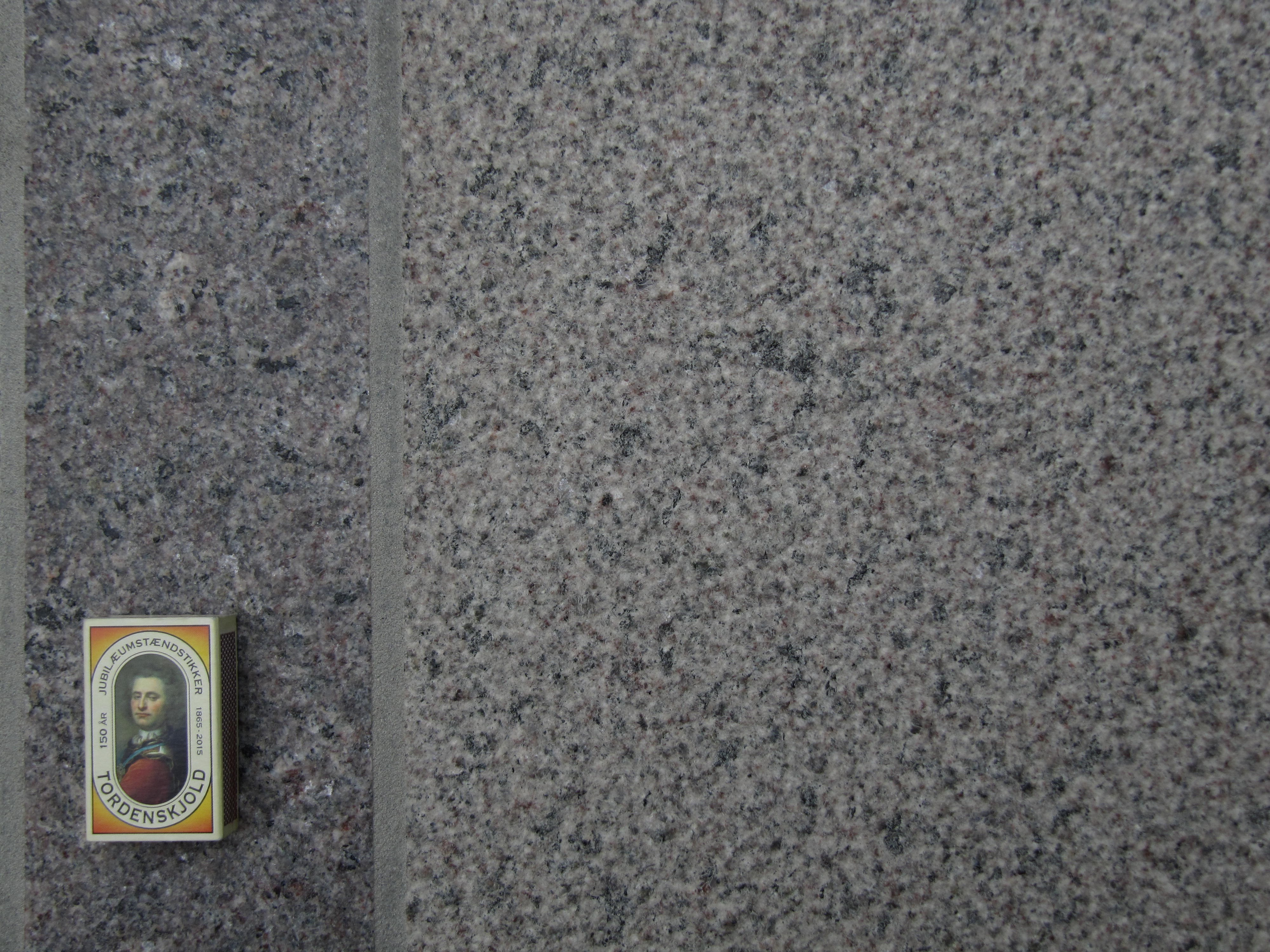 Fliser i Hammer granit, dels jetbrændt (ved tændstikæsken), dels stokhugget; æsken er 6 cm lang.